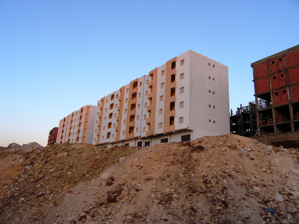 Batiment ouled malek mohammadia